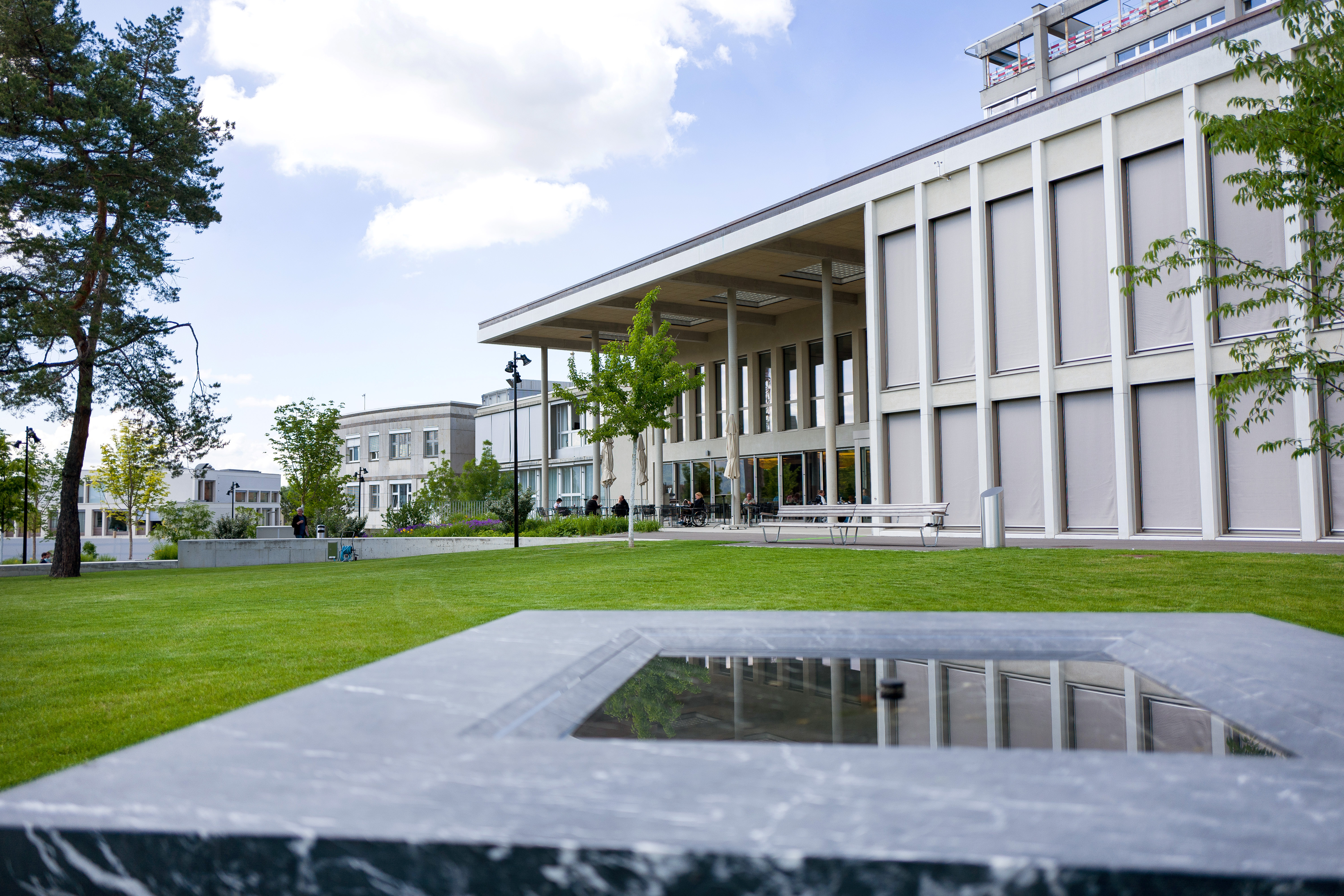 Im Vordergrund der Anbau mit der Cafeteria und Terrasse sowie der Park. Das Zentrum für Paraplegie befindet sich links im Hintergrund.